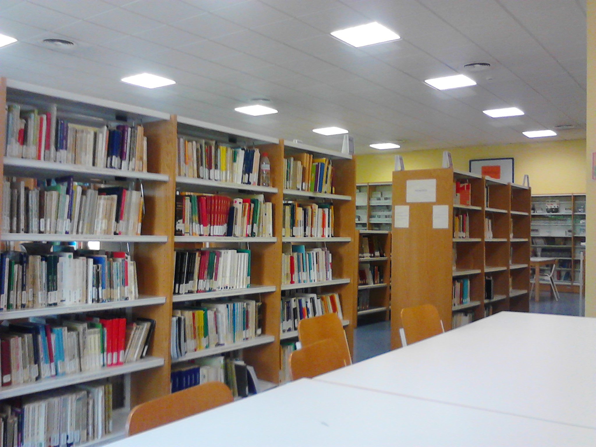 Biblioteca de la Facultad de Ciencias de la Educación de la Universidad de Córdoba (España).